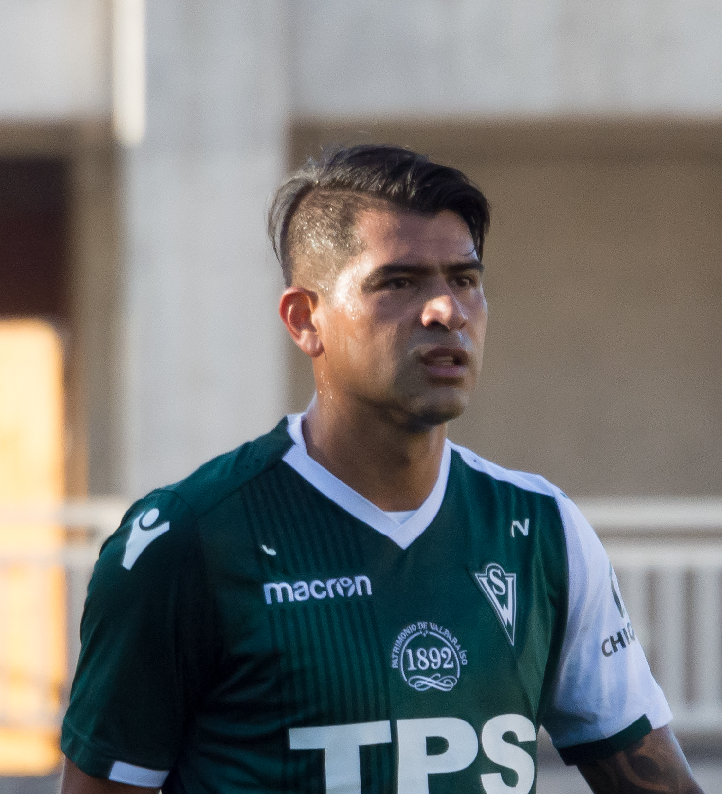 Enzo Gutiérrez, San Luis v Santiago Wanderers, Estadio Municipal Lucio Fariña Fernández, Quillota, Región de Valparaíso, Chile.